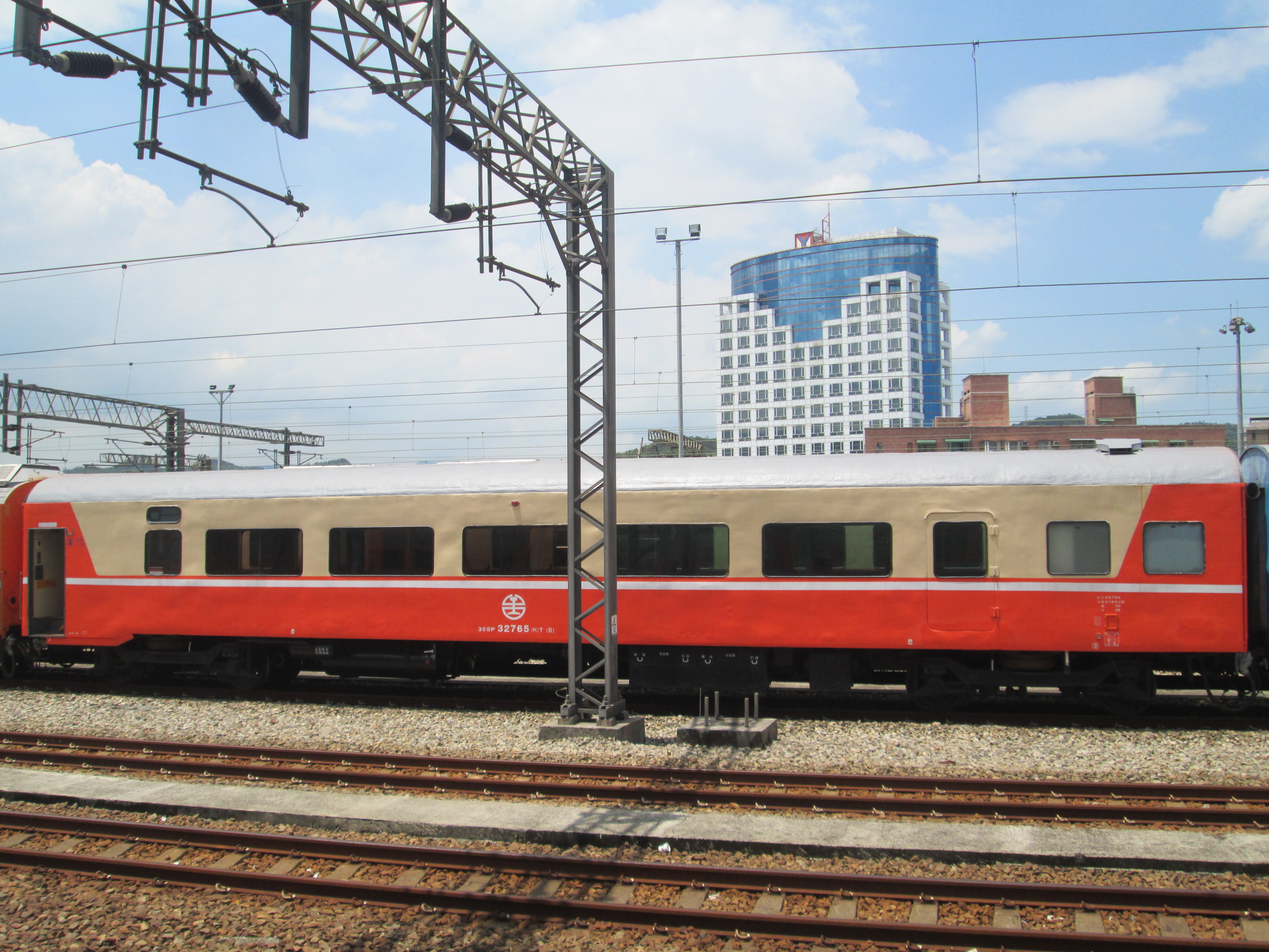 臺灣鐵路管理局莒光號客車35SP32765(K)T(B)停靠七堵調車場。